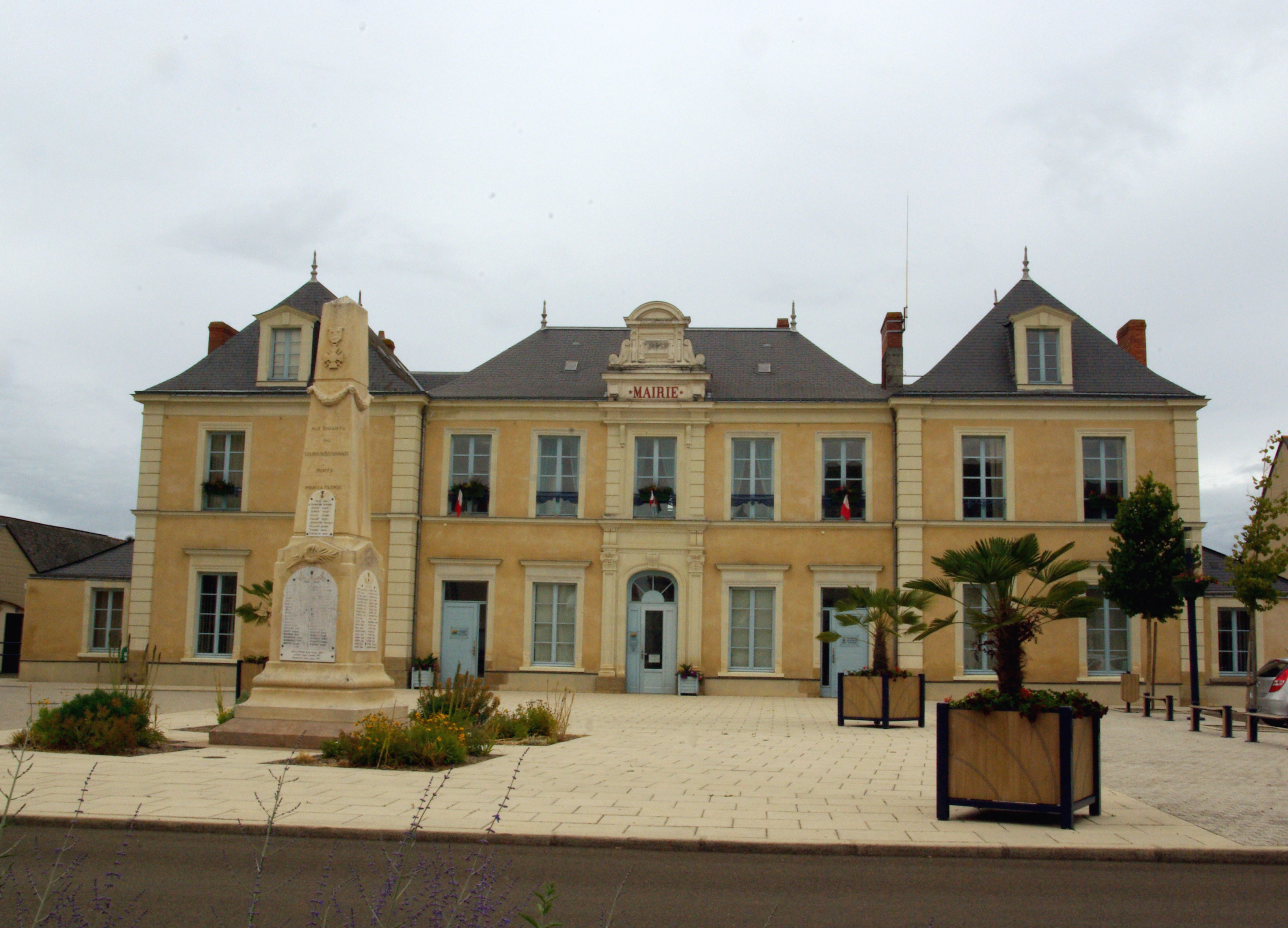 Mairie du Louroux-Béconnais